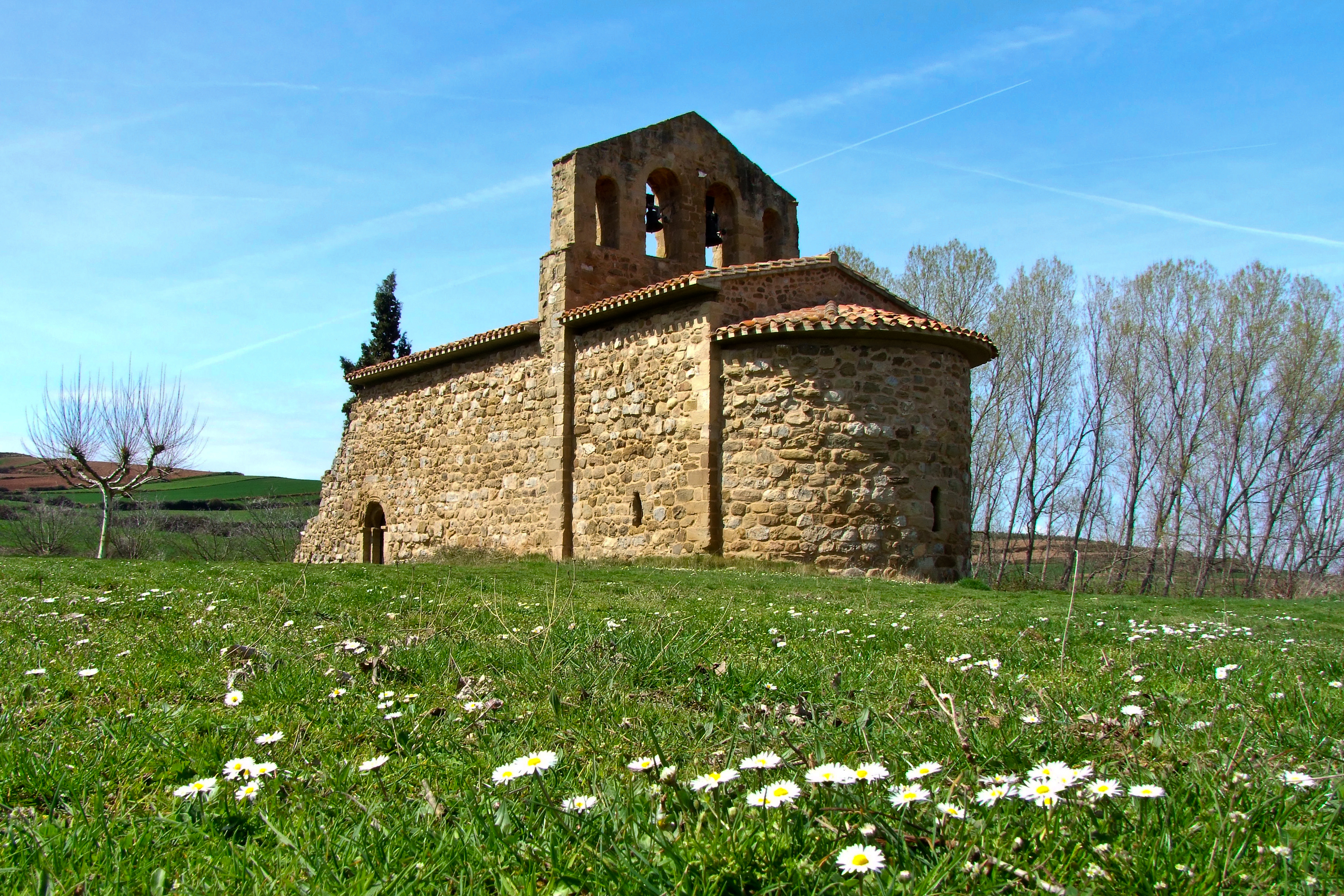 Ermita de Santa Fe de Palazuelos en la localidad de Albelda de Iregua, La Rioja - España